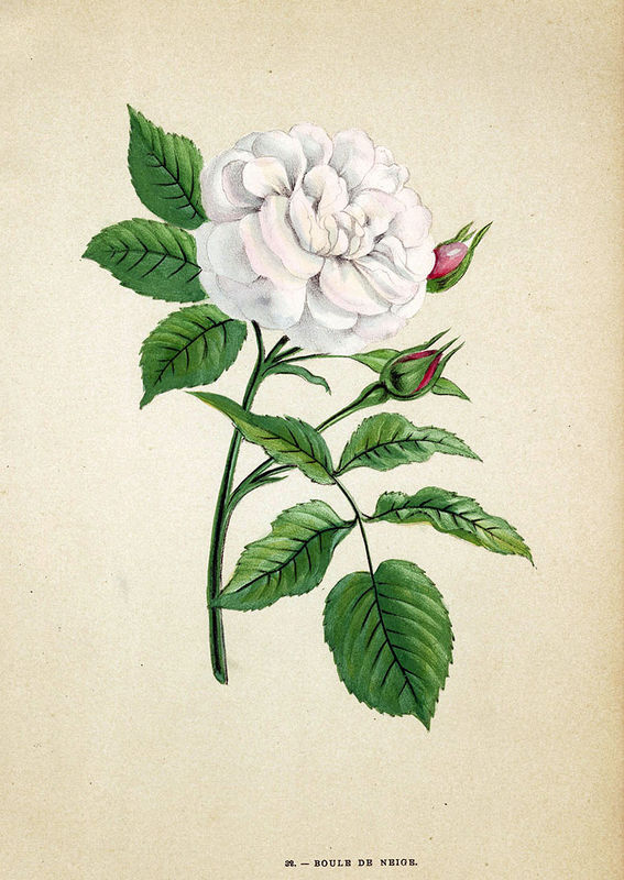 Rose 'Boule de Neige' (Lacharme 1867) hybride remontant, illustration in Hippolyte Jamain et Eugène Forney, Les Roses, 1873, Paris, éd. Jules Rothschild